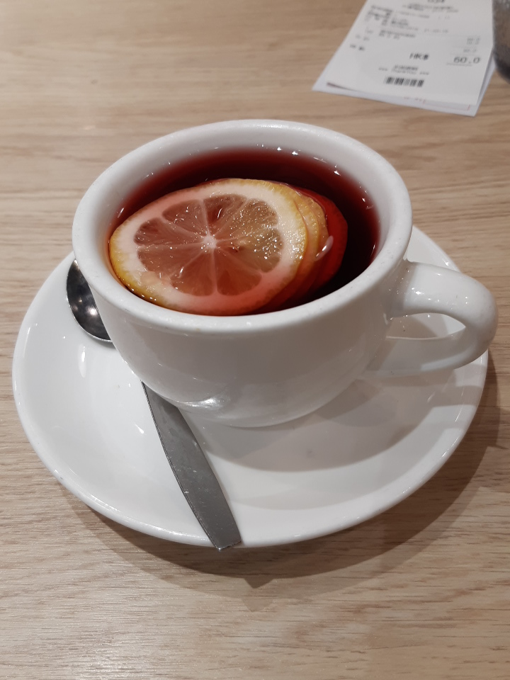 熱的港式檸檬咖啡